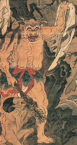 Keneō (懸衣翁) from Jūō-zu (十王図)